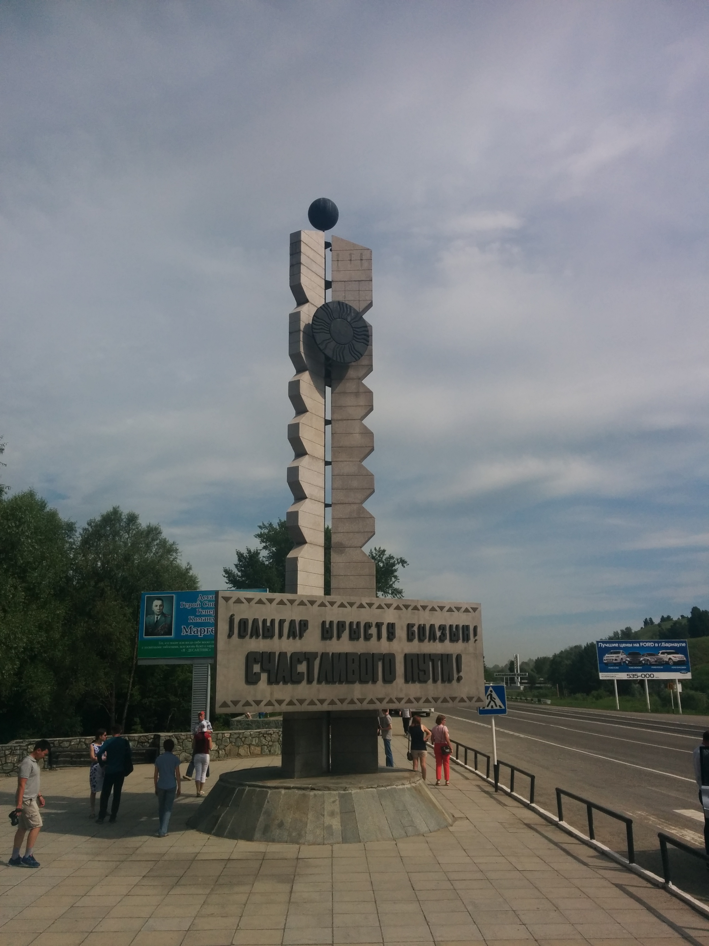 Тыва дыл: Алтай Республикадан чоруп бар чыдырда адрези